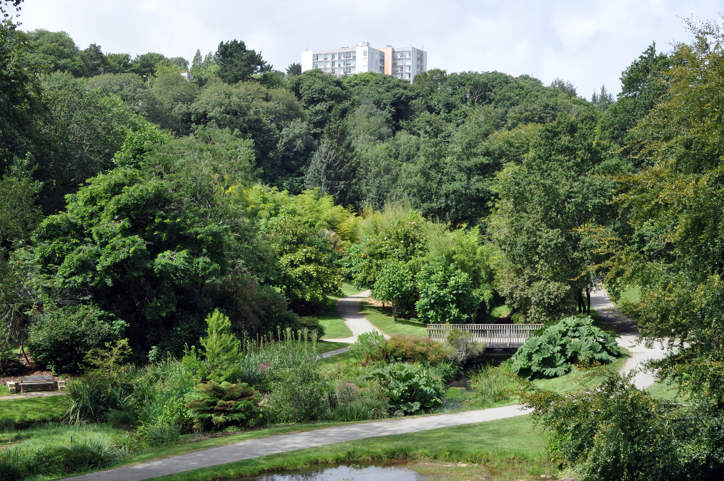 Conservatoire botanique national de Brest